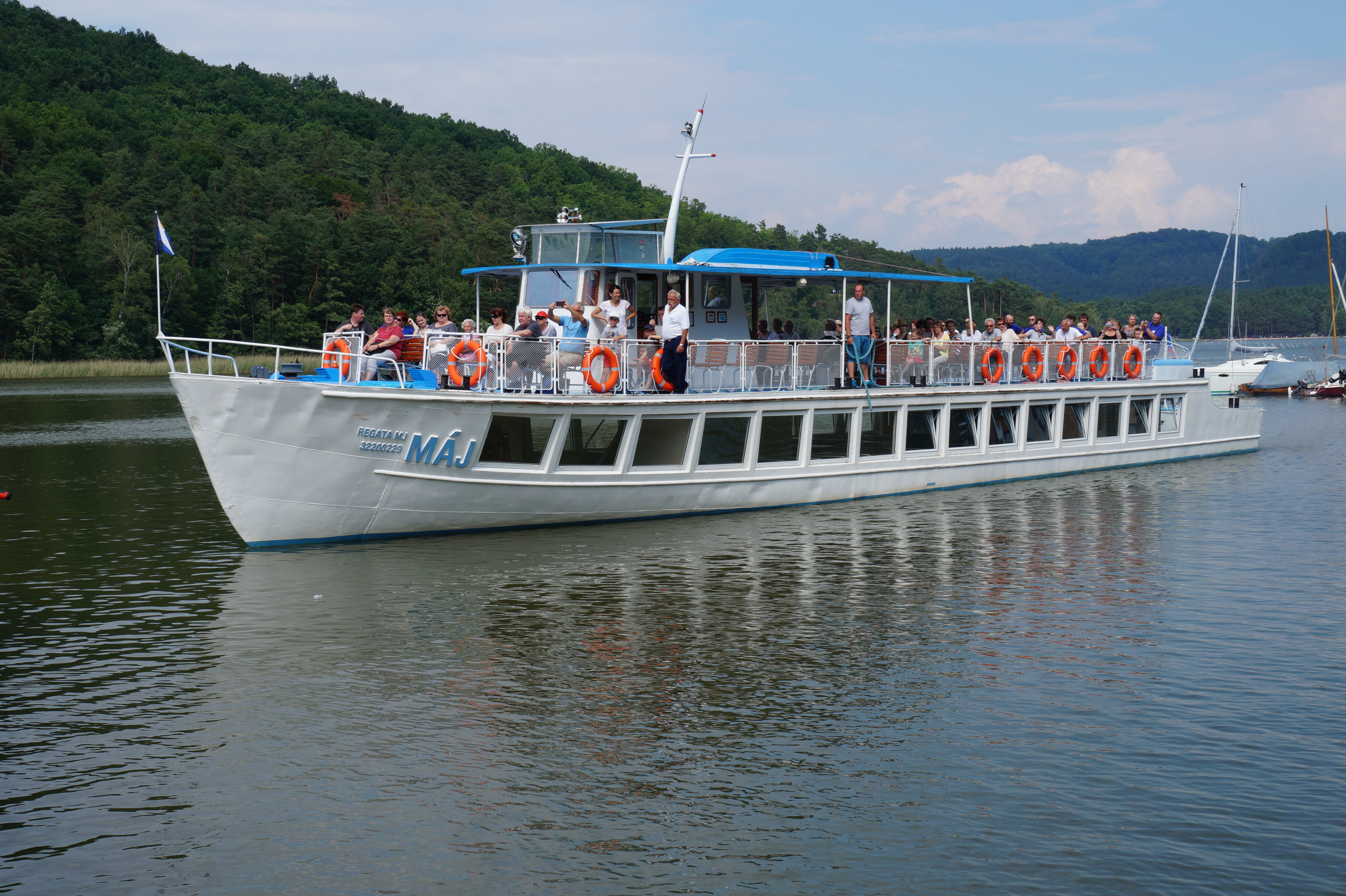 Loď Máj připlouvá do přístaviště ve Starých Splavech